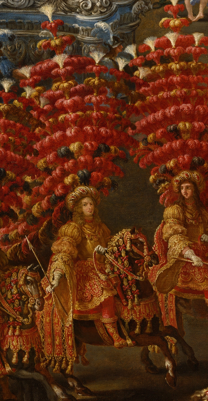 Maffeo Barberini Principe di Palestrina in costume da Amazzone - Dettaglio del dipinto La Giostra dei Caroselli, opera che raffigura la sfarzosa parata allegorica organizzata a Palazzo Barberini, durante il carnevale del 1656, in onore di Cristina di Svezia da poco giunta a Roma dopo l'abdicazione dal trono svedese